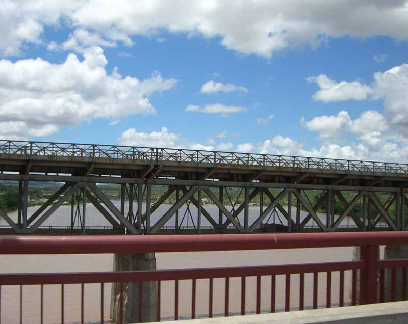 Аутор Радован Корда, 18 Јануар 2006. Беит мост